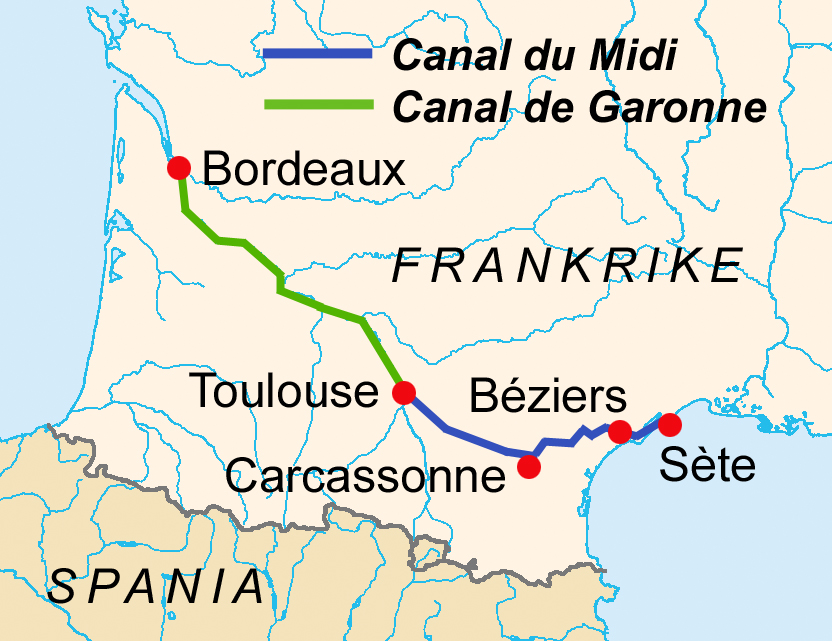 El canal de los dos Mares: Canal del Midi + Canal de Garona Map of Canal du Midi and Canal de Garonne, France.